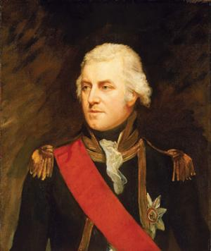 John Borlase Warren (1753-1822)